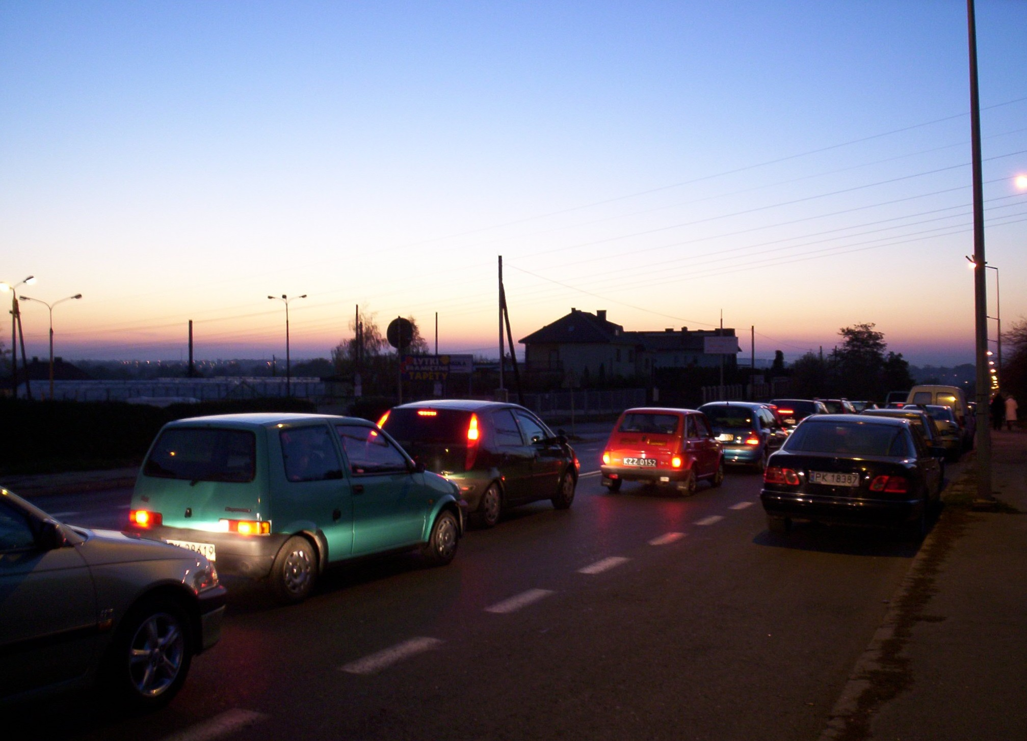 Kalisz-Winiary ul. Łódzka